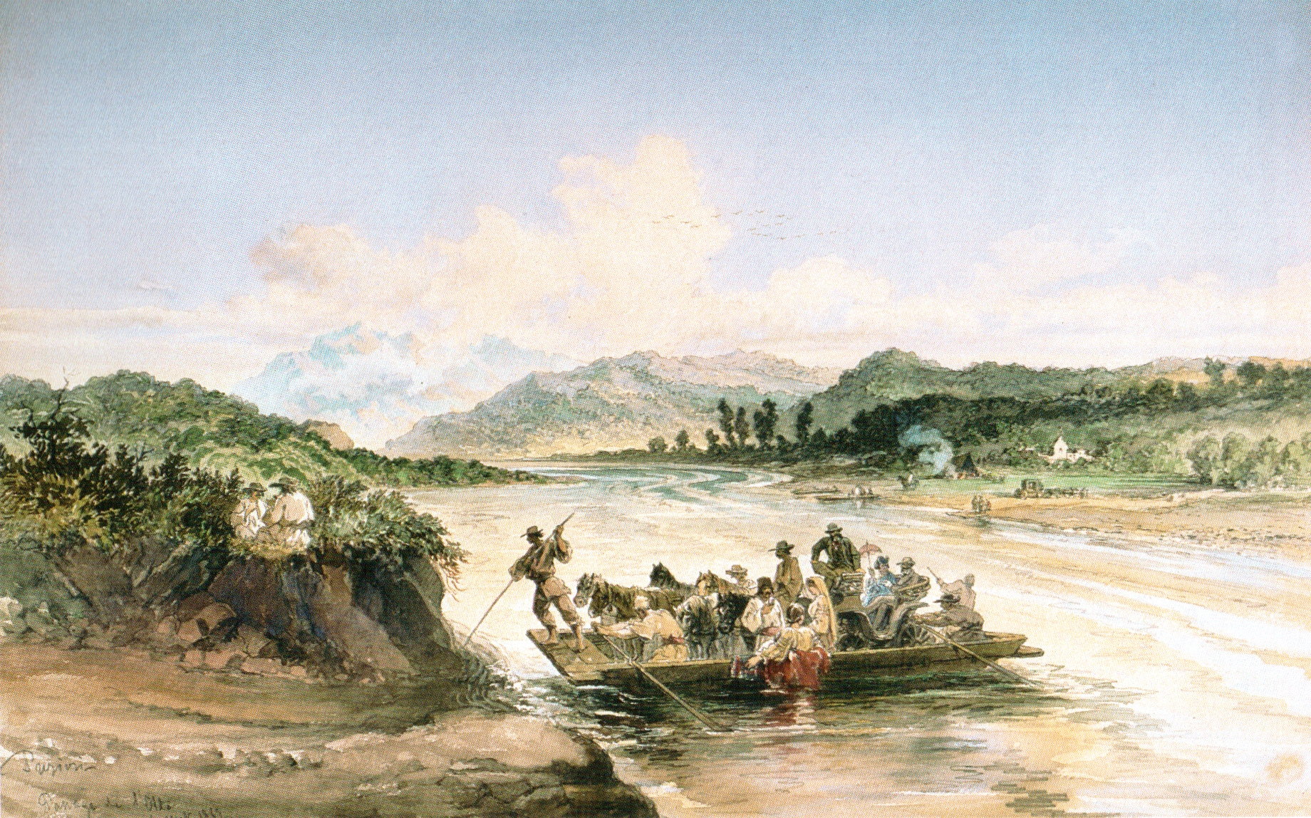 Trecerea Oltului